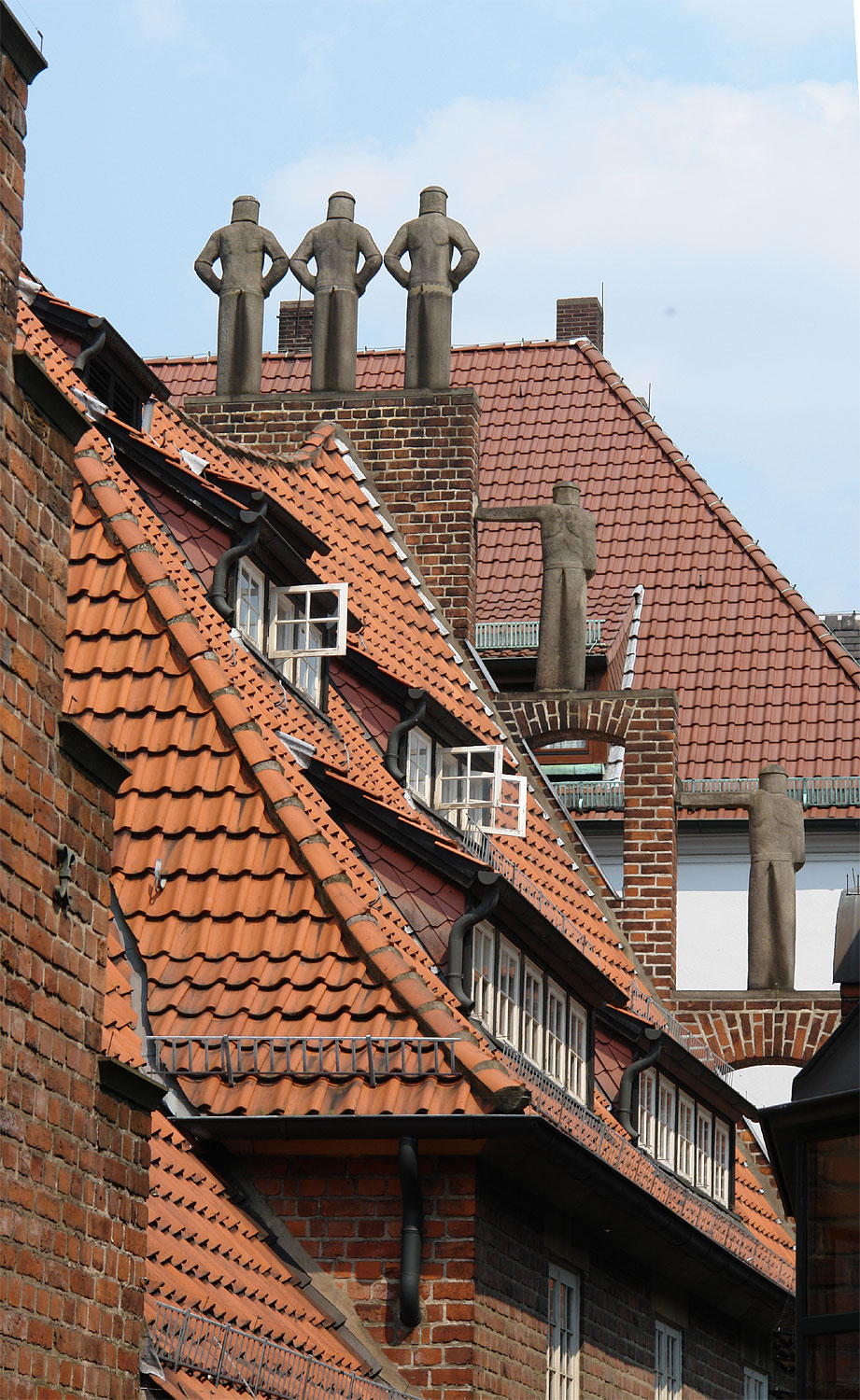 Böttcherstraße Bremen: Giebelrückseite Haus der Sieben Faulen. Erbaut 1924-27, Steinfiguren von Aloys Röhr